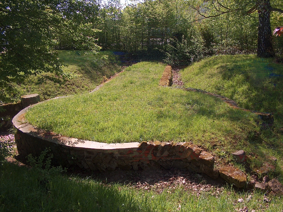 Römerkastell Saarbrücken